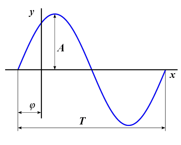 Represetación gráfica de una oscilación armónica simple con indicación de algunos de sus parámeros.